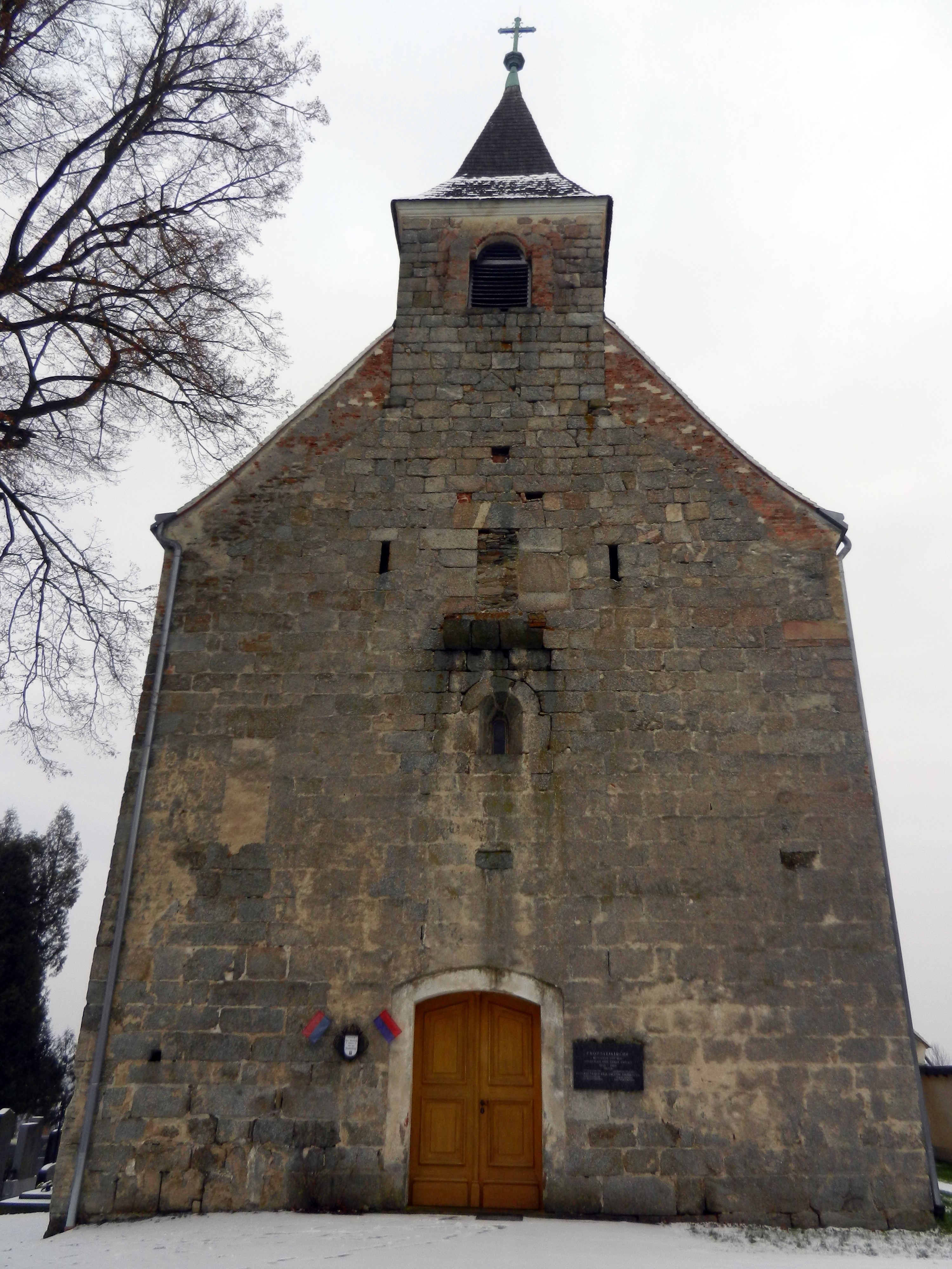 Propsteikirche Zwettl Portal